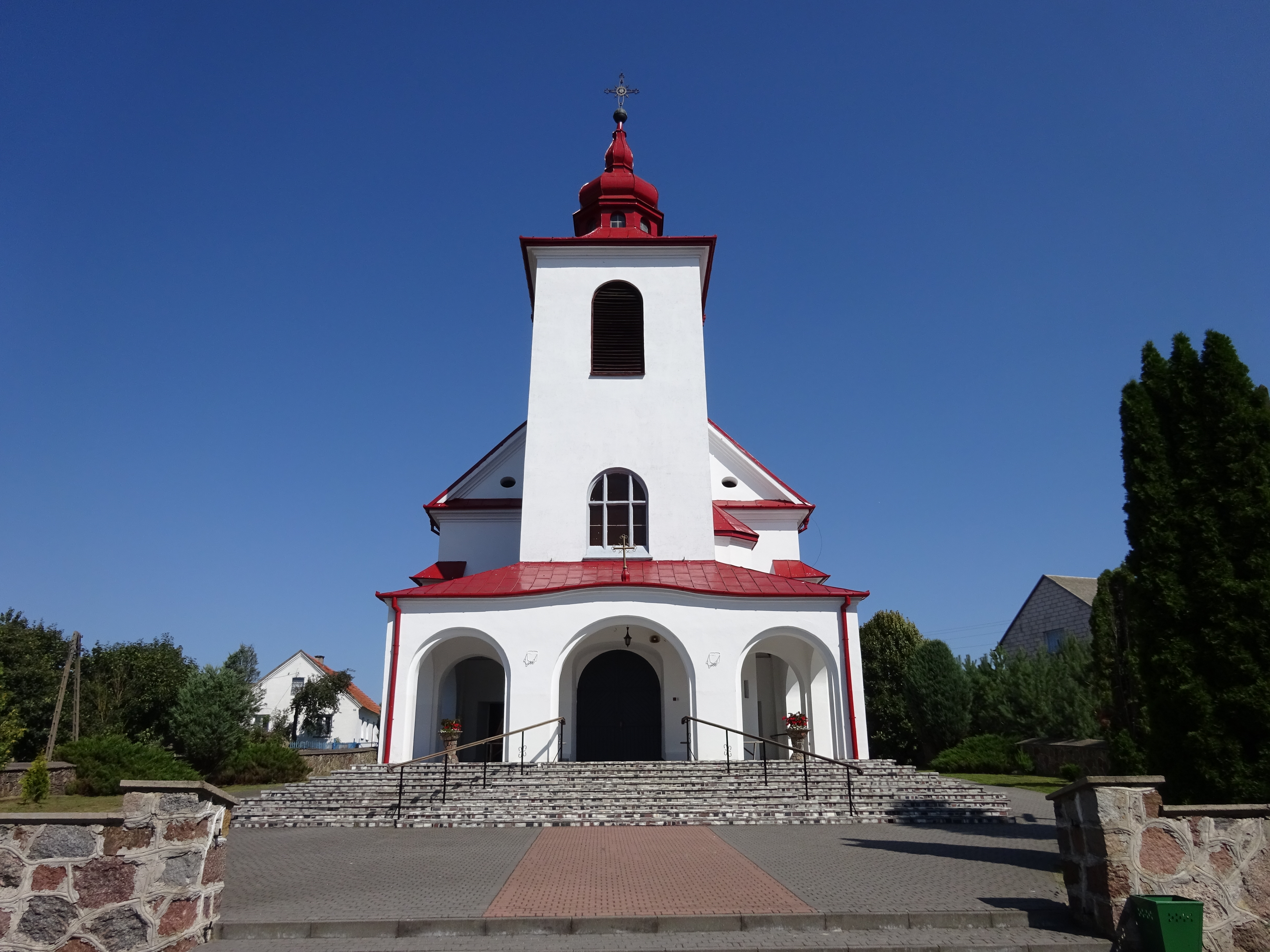 Kościół pw. Trójcy Świętej w Borkowie